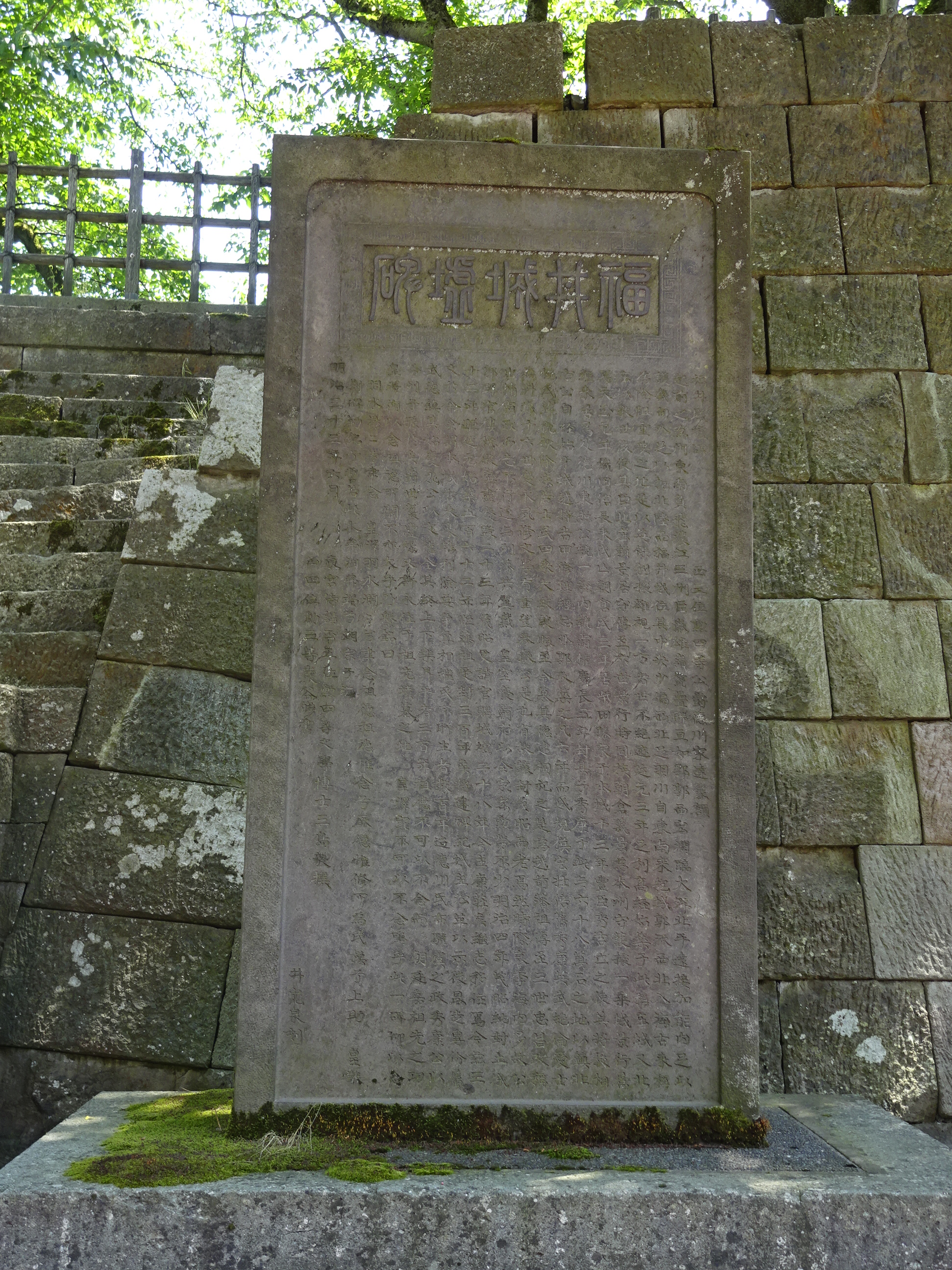 福井城虎口跡に建つ「福井城墟碑」,1899年（明治32年）6月建立。2019年5月25日撮影。